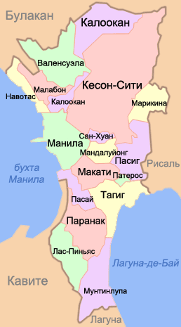 Карта Столичного региона Филиппин